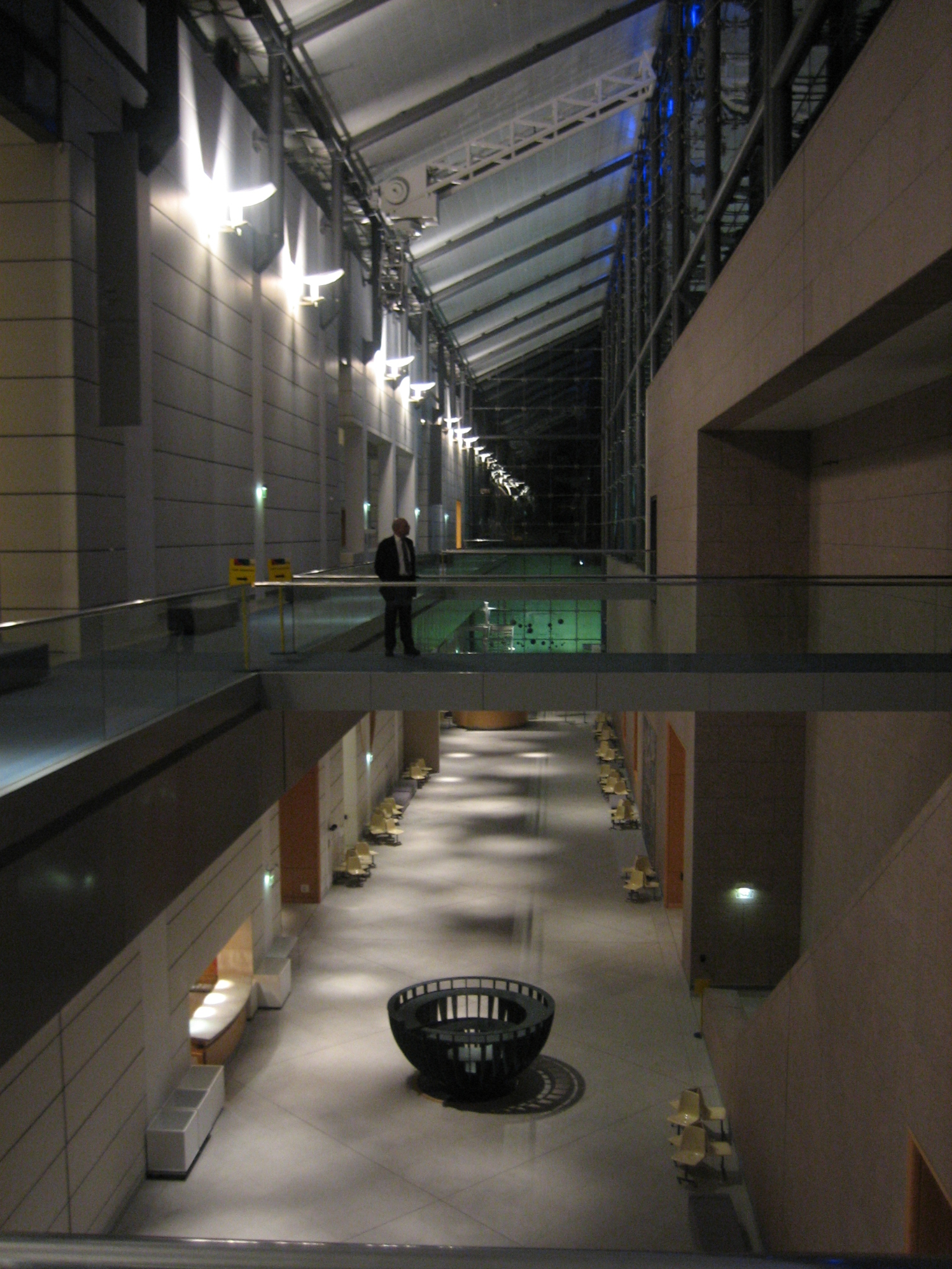 Musée d'art moderne et contemporain de Strasbourg (MAMCS), Hall principal en nocturne